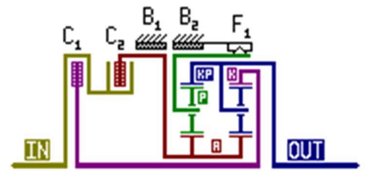 Simpson-planeettavaihde